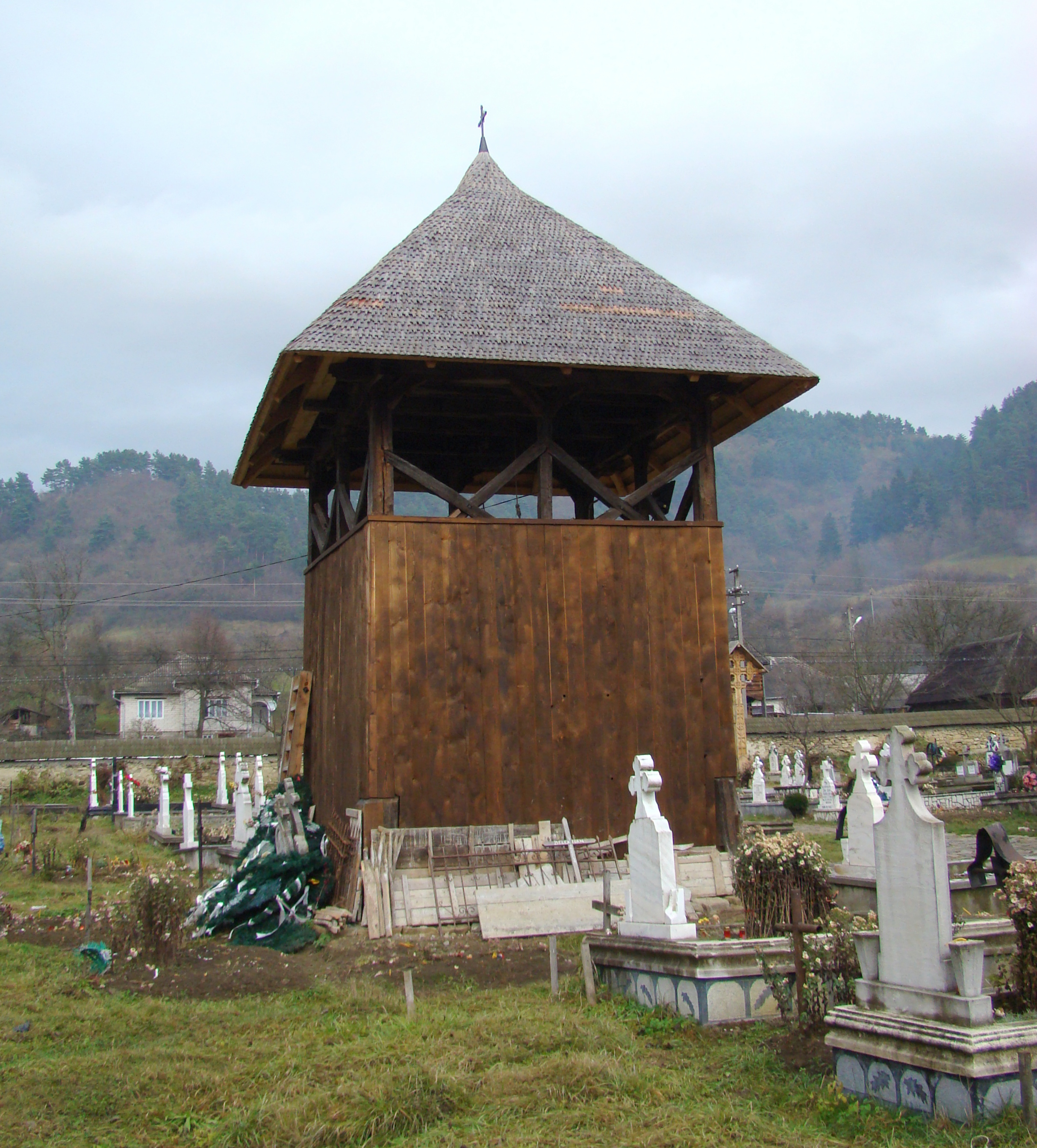 Biserica de lemn „Sf.Arhangheli” din Rozavlea, județul Maramureș 02